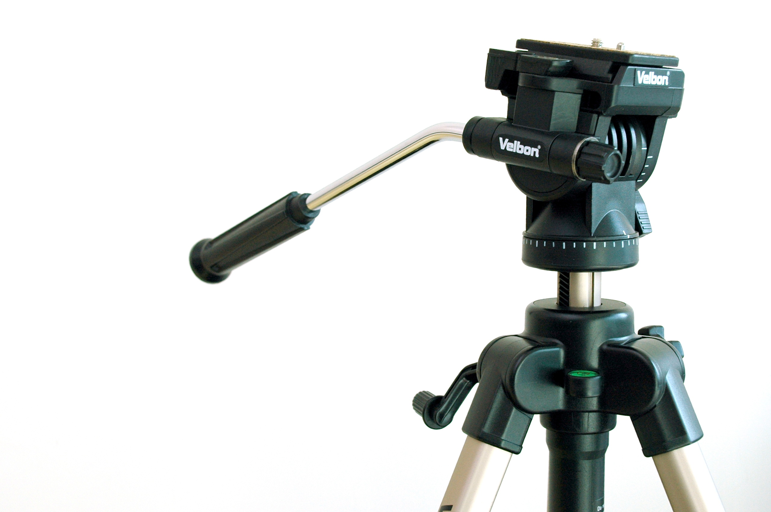 可前後傾及水平旋轉的油壓雲台